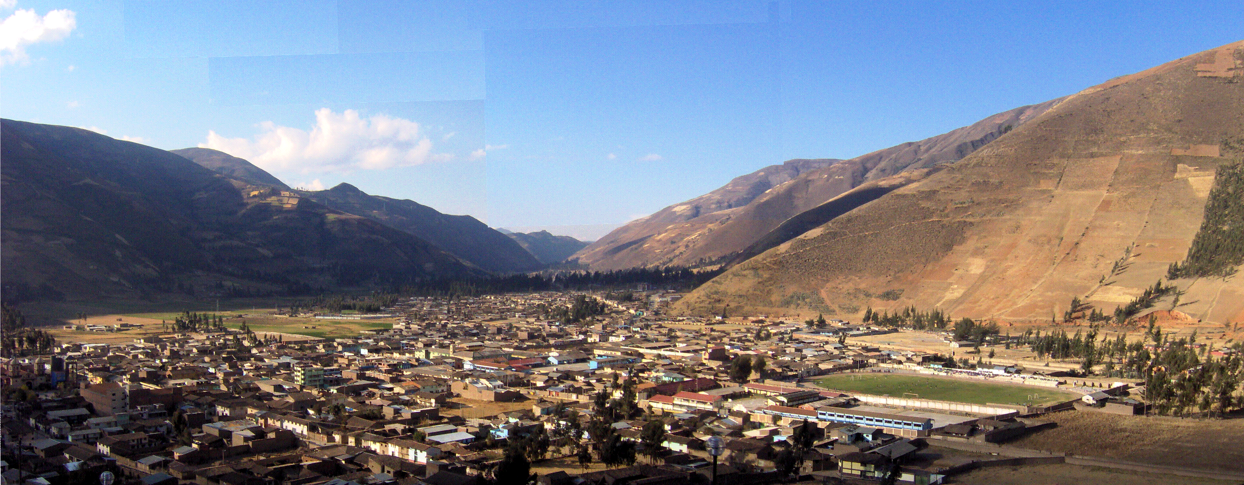 El valle de Pampas